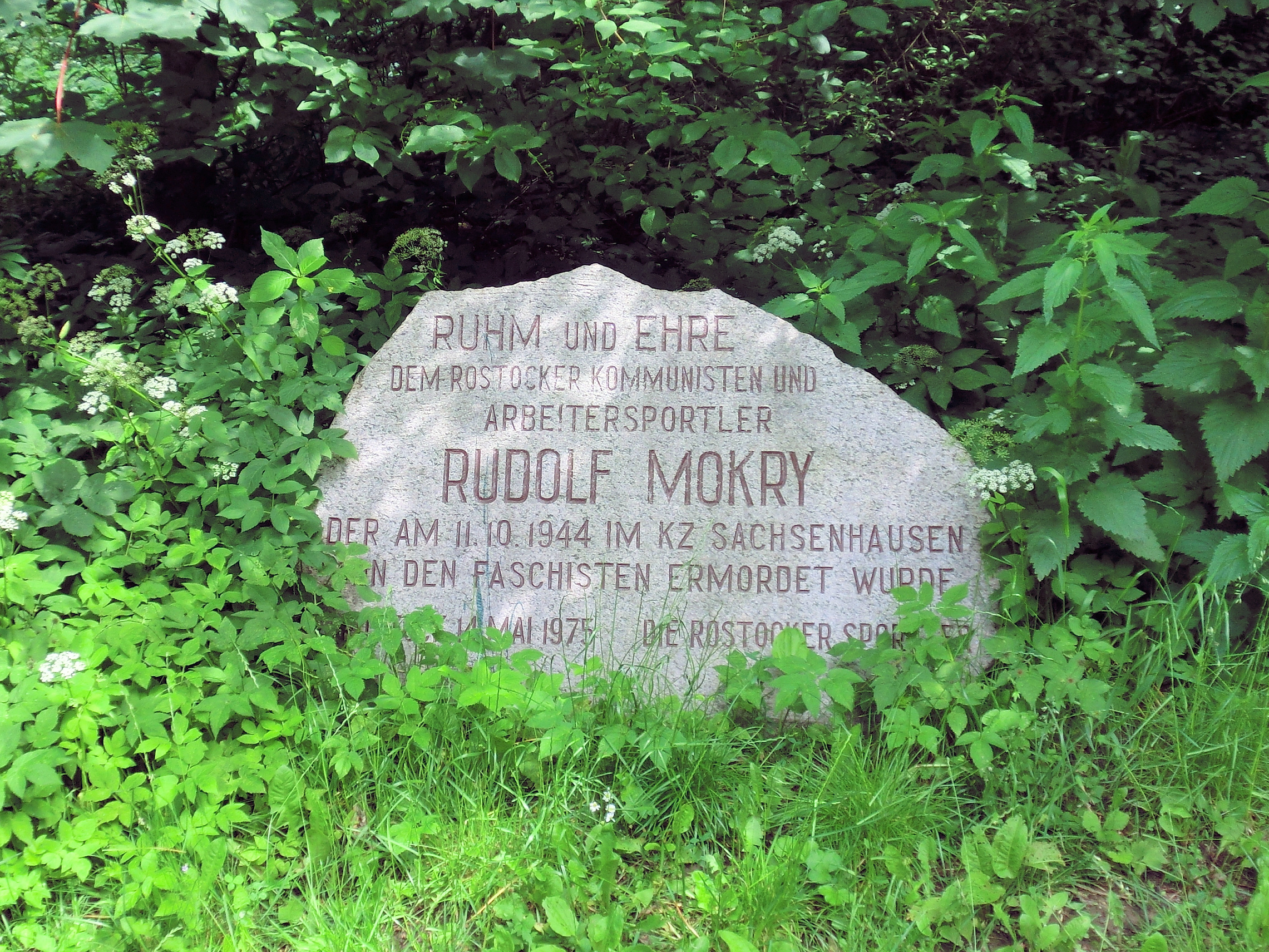 Gedenkstein für Rudolf Mokry von 1975 im Barnstorfer Wald in Rostock